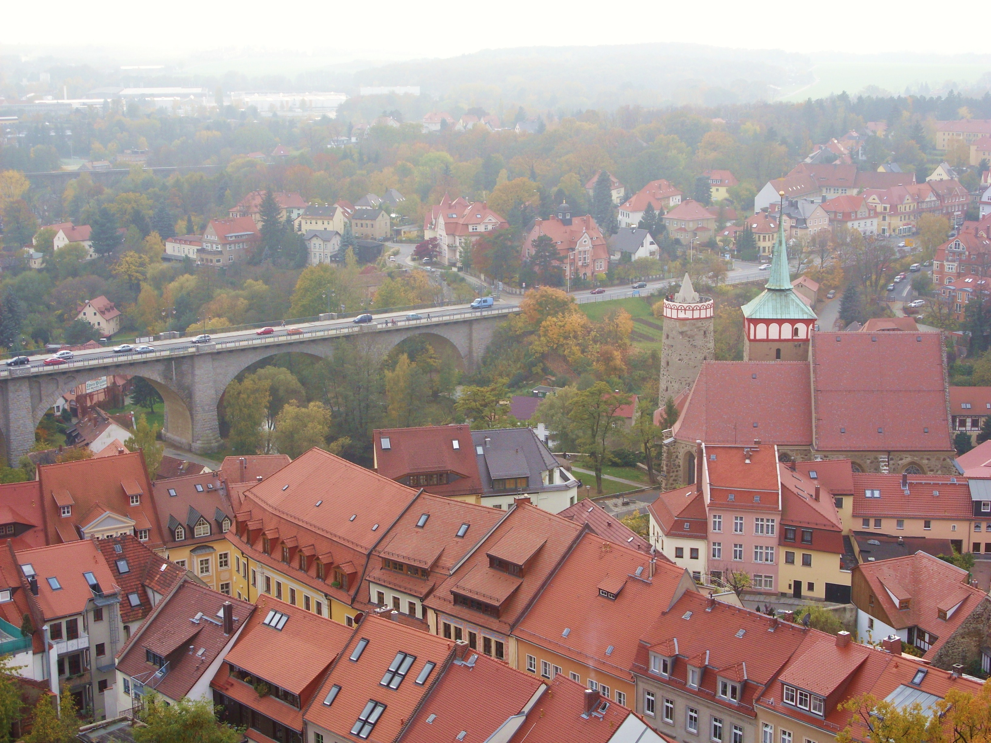 Bautzen; Blick vom Petridom nach Südwesten. Bemerkenswerte Gebäude: Alte Wasserkunst und Michaeliskirche (rechts), Friedensbrücke (linke Bildhälfte). Hornjoserbsce: Budyšin; Stara wodarnja, Michałska cyrkej a Móst měra kaž widźane z wěže katedraly swj. Pětra.